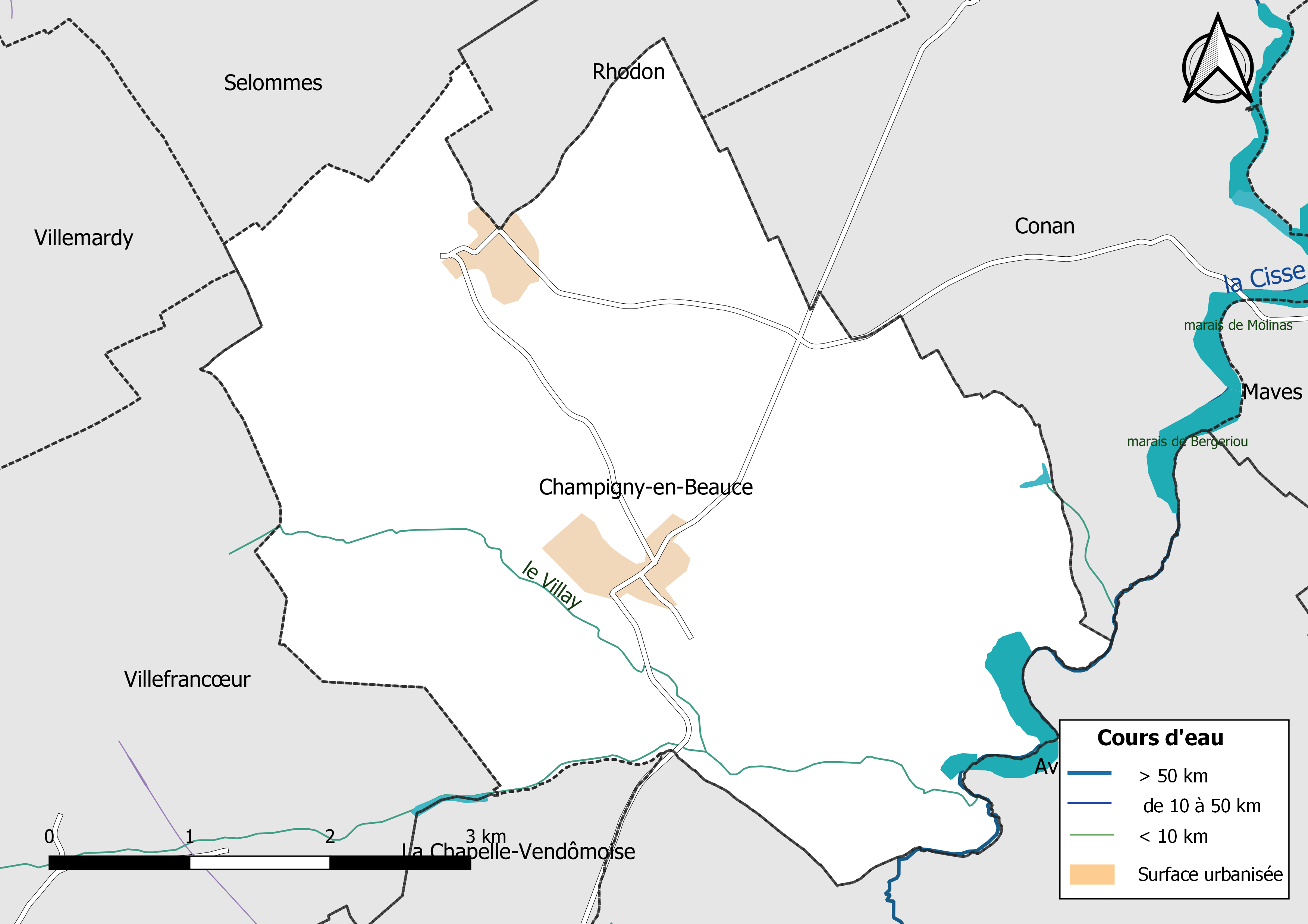 Carte du réseau hydrographique de la commune de Champigny-en-Beauce (Loir-et-Cher, France).